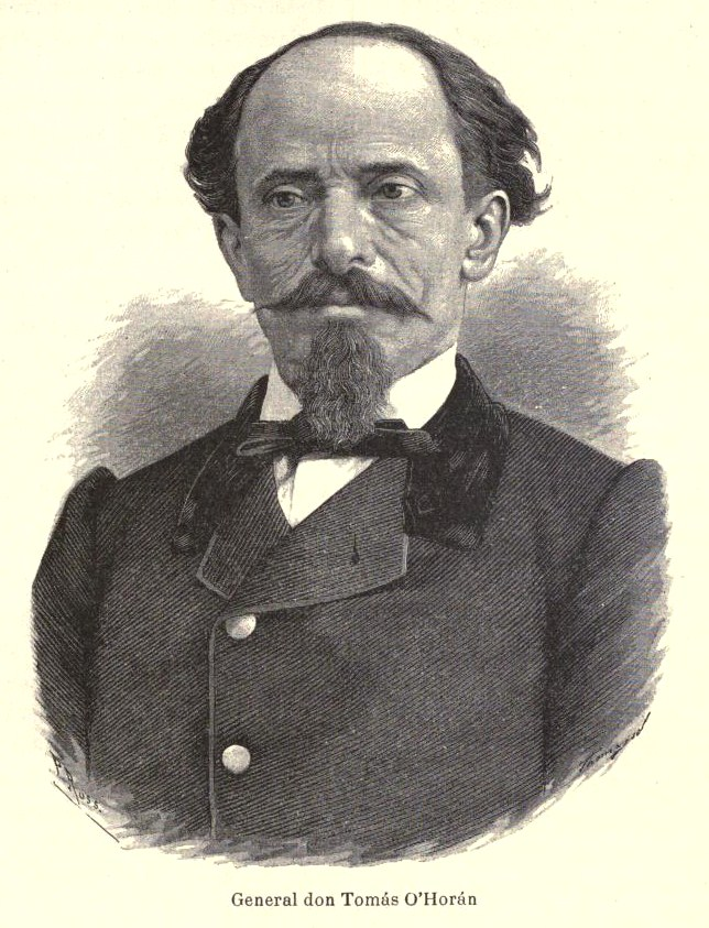 General Tomás O'Horán, político y militar mexicano